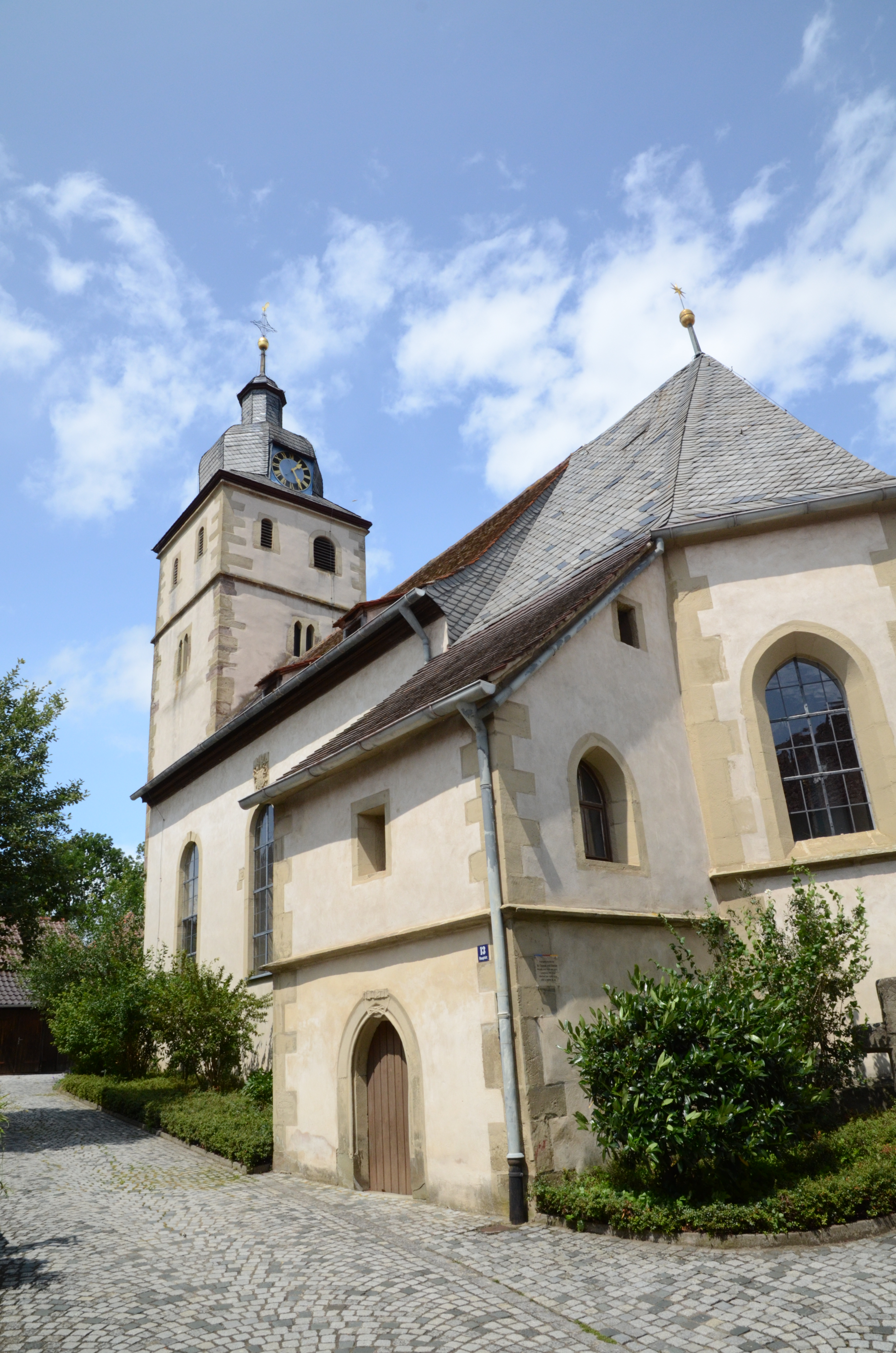 Sankt Cosmas und Damian in Euerbach